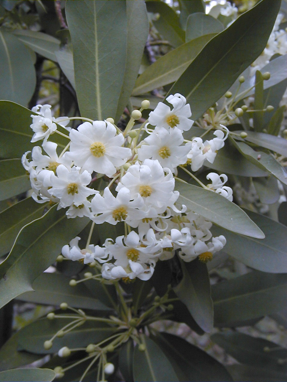 Drimys winteri, Winteraceae. Real Jardín Botánico, Madrid